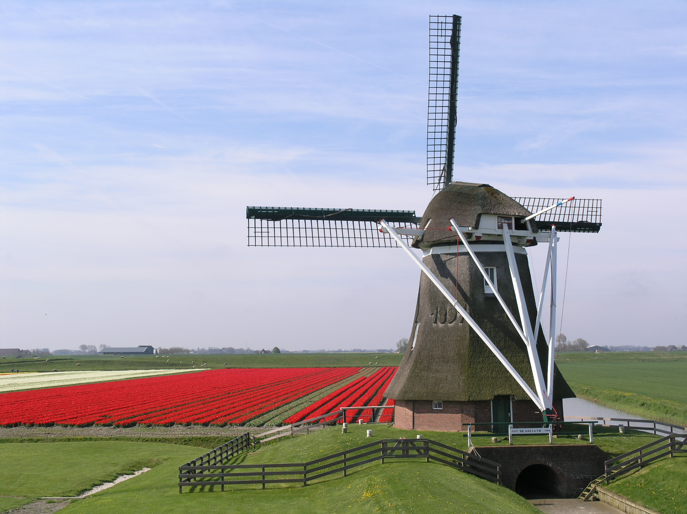 Uithuizermeeden Poldermolen Goliath